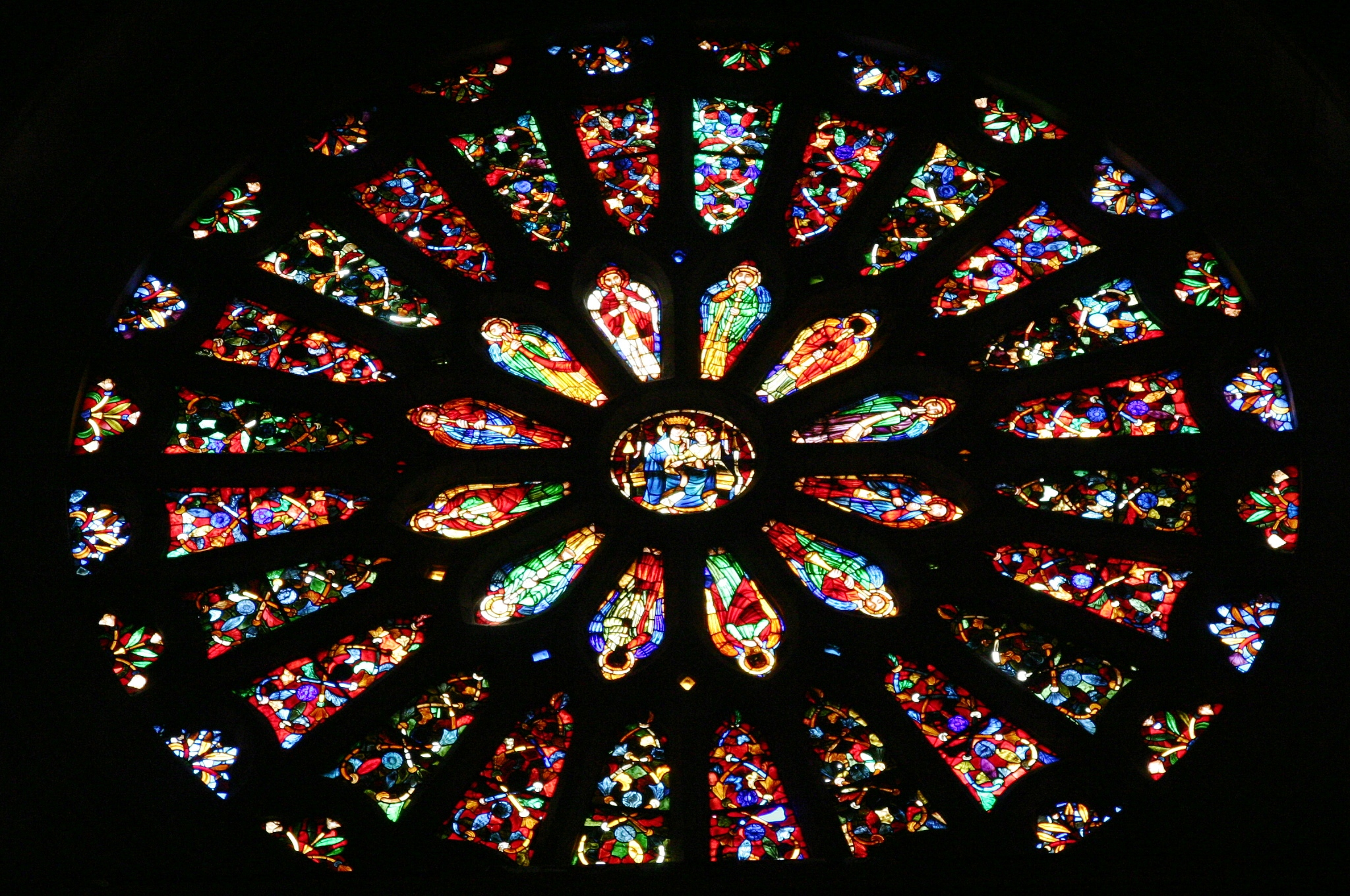 Roseta